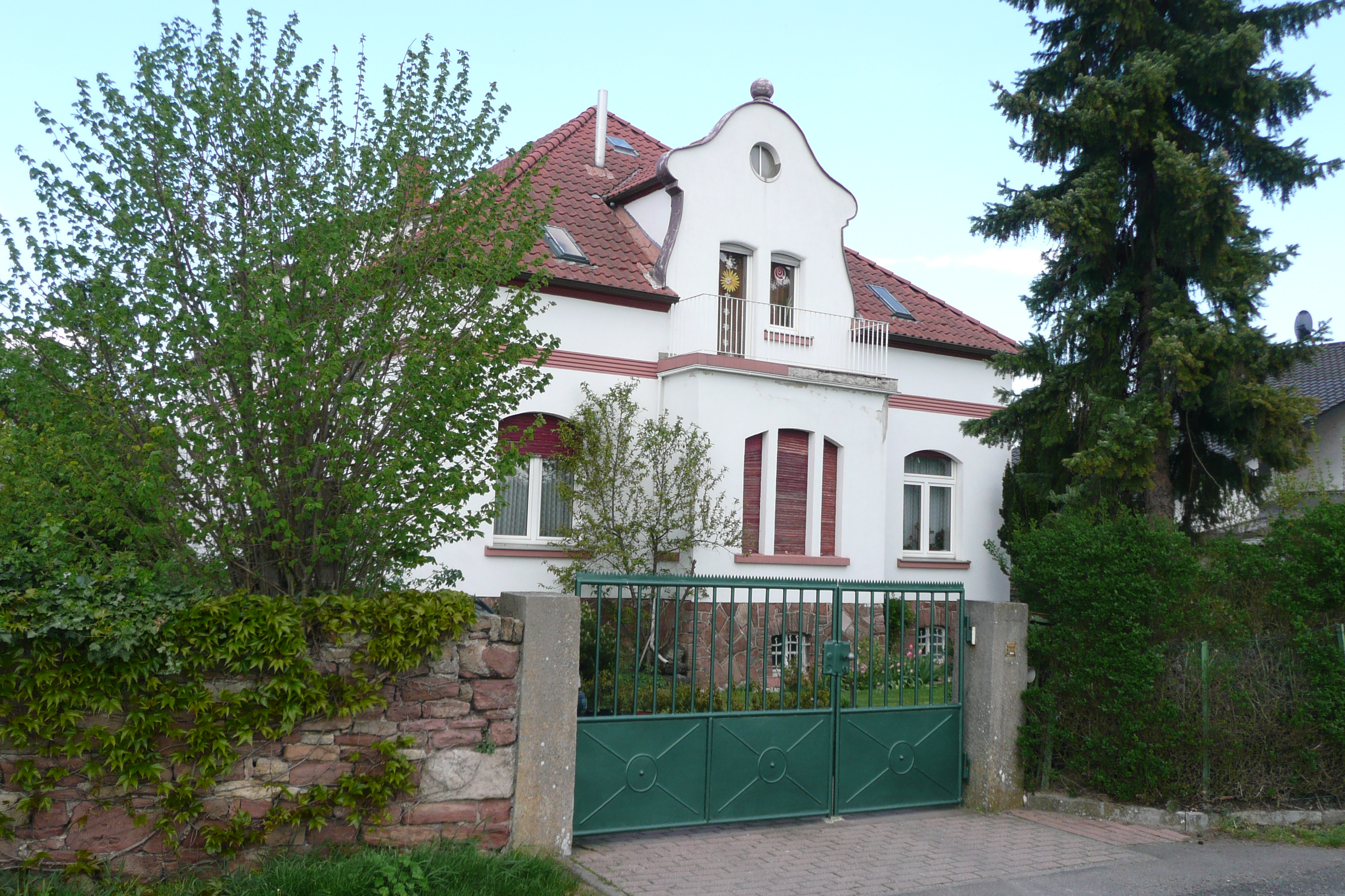 Villa von Edelobstzüchter Otto Dahlem